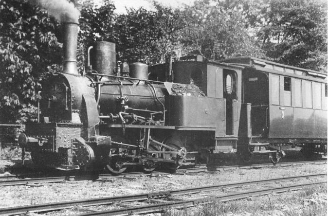 Lokzug der Kleinbahn Bremen - Tarmstedt "Jan Reiners"